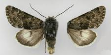 Lasionycta staudingeri preblei male